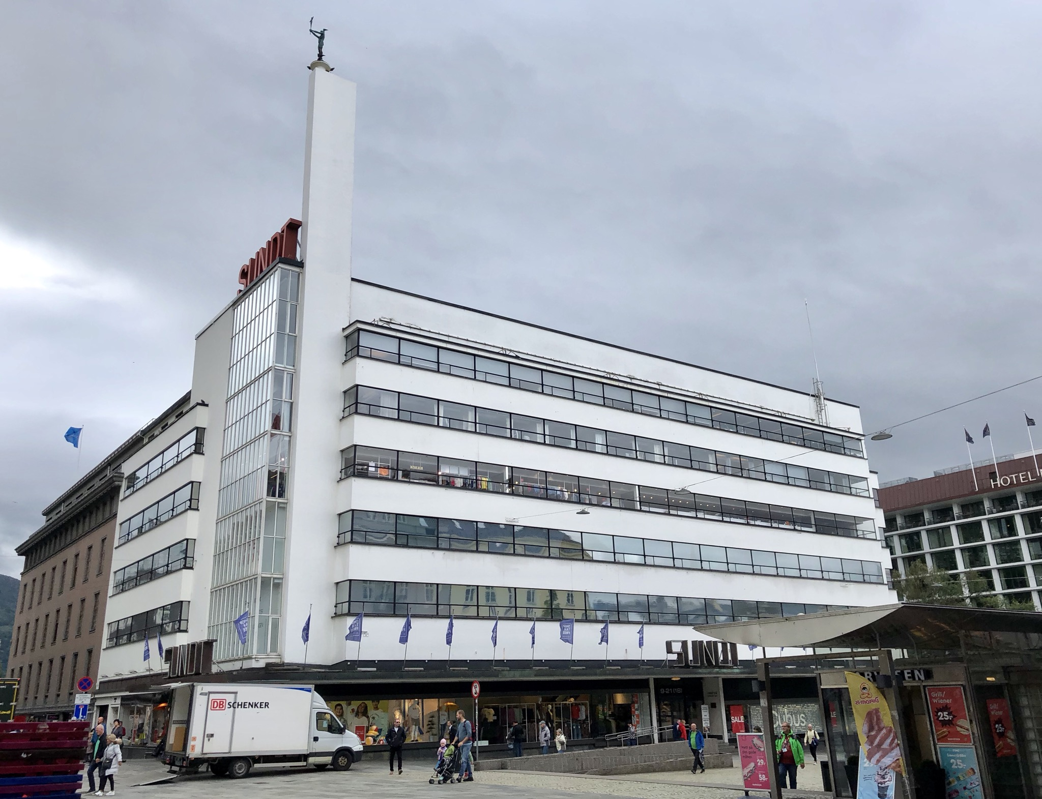 Sundts Kaufhaus in Bergen